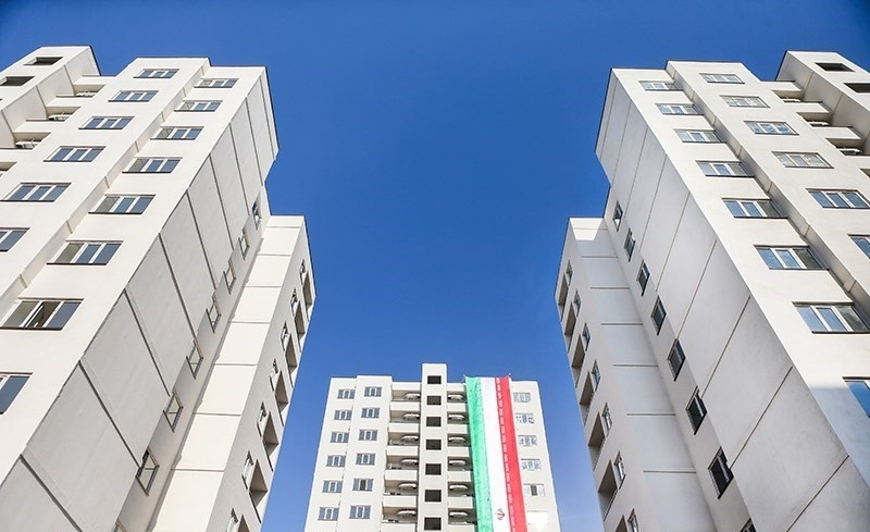 آپارتمان در ایران